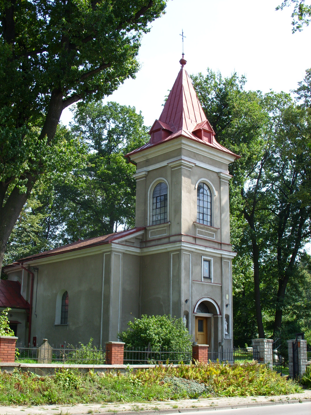 kościół św. Marka w Żywcu